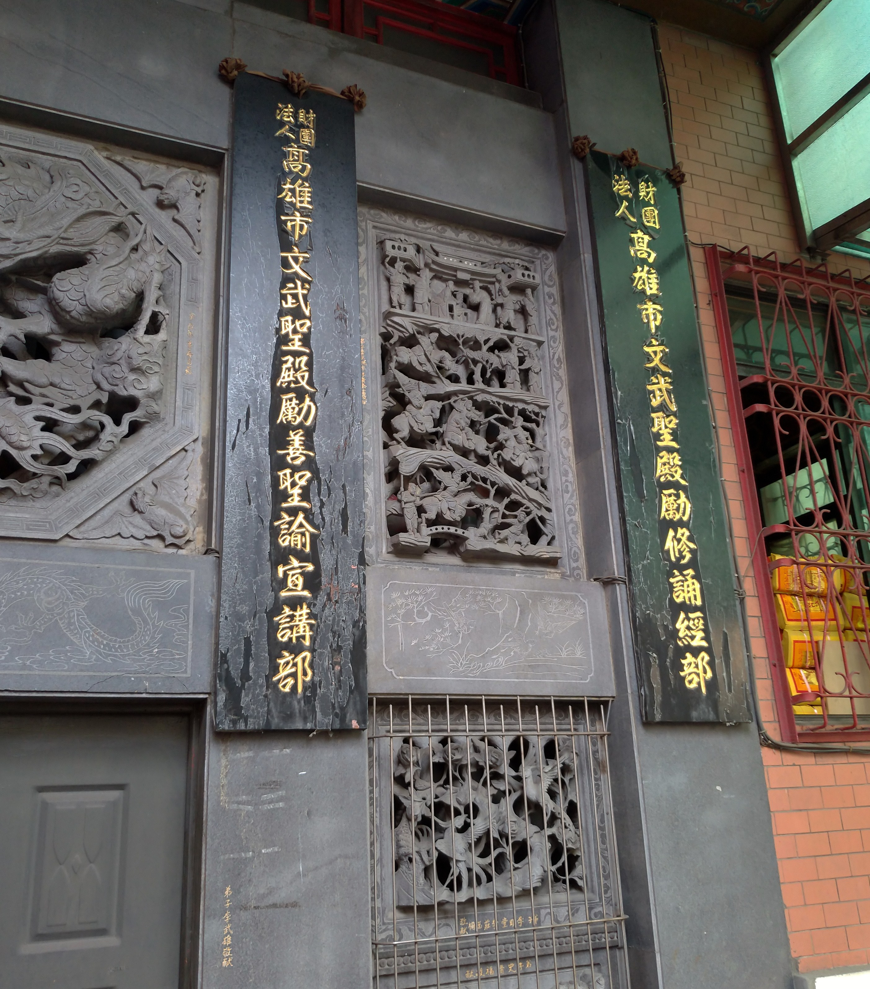 中文（台灣）: 文武聖殿勵善聖諭宣講部及勵修誦經部之牌匾。；使用本圖片請遵循(CC 姓名標示-非商業性-禁止改作)，Please follow (CC BY-NC-ND 3.0 TW)